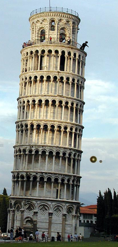 Turyści obserwujący Galileusza zrzucającego kule z Krzywej Wieży w Pizie (fotomontaż ilustrujący eksperyment)